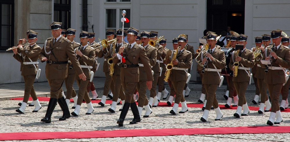 Orkiestra Reprezentacyjna Wojska Polskiego podczas oficjalnego powitania Prezydenta Republiki Francuskiej, Jego Ekscelencji Mikołaja Sarkozy'ego.